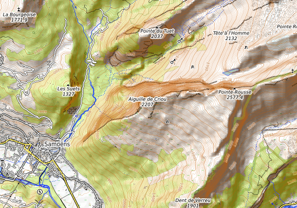 carte réalisée sur umap This map may be incomplete, and may contain errors. Don't rely solely on it for navigation.